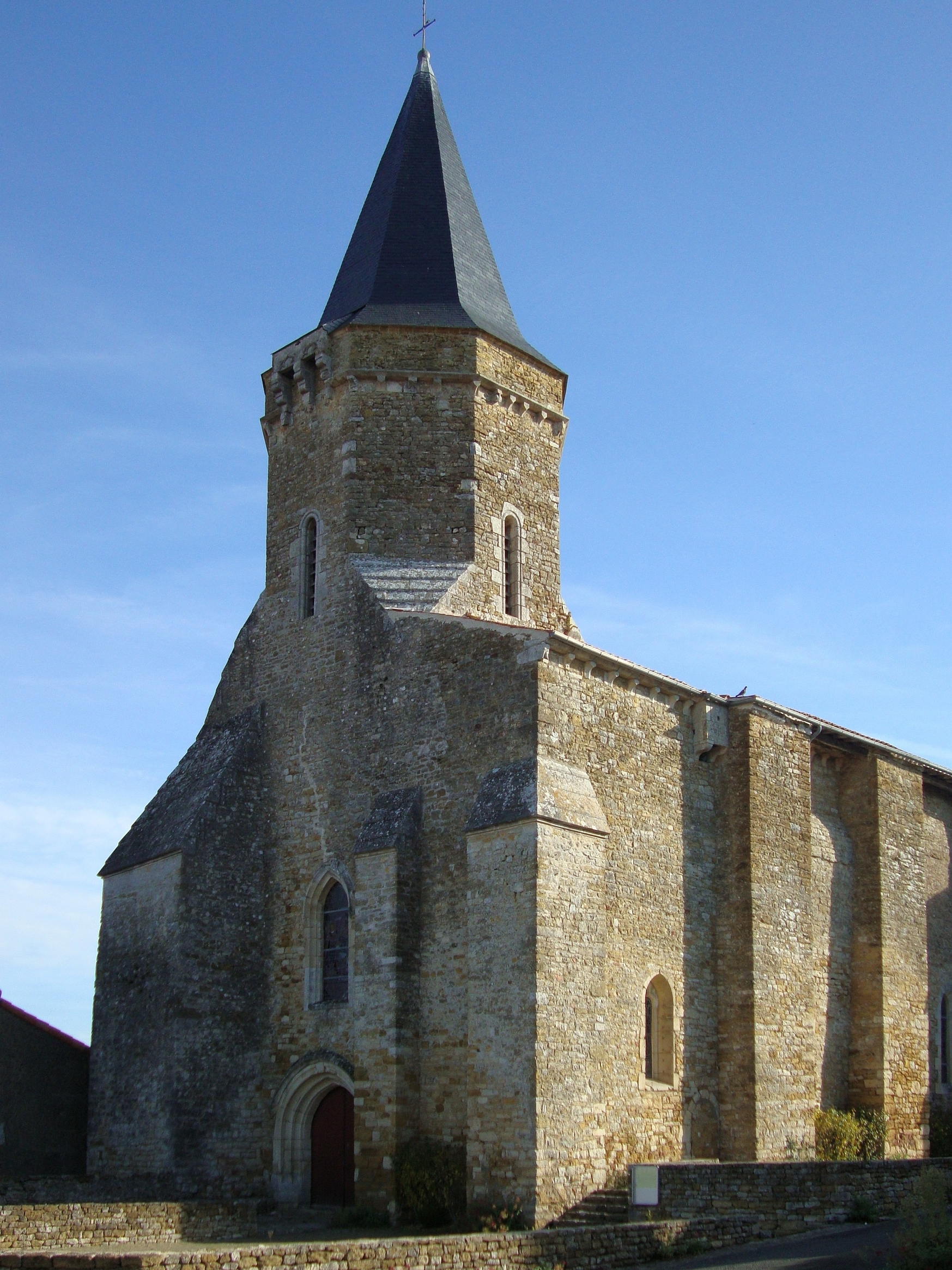 Église Saint-Georges de Saint-Juire-Champgillon, (Inscrit, 1984) .